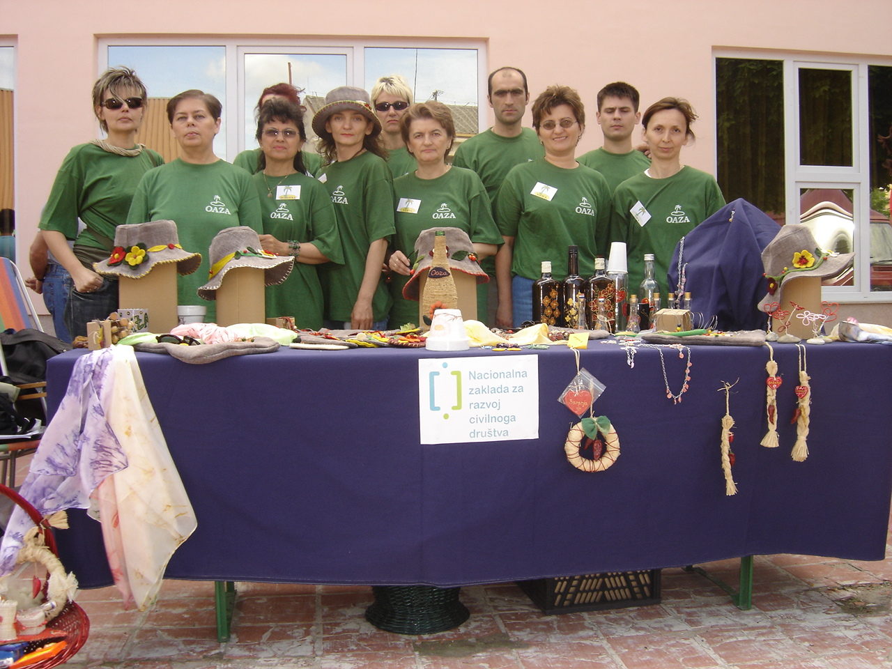 Sajam udruga Baranje, Mirovna grupa Oaza (organizator)